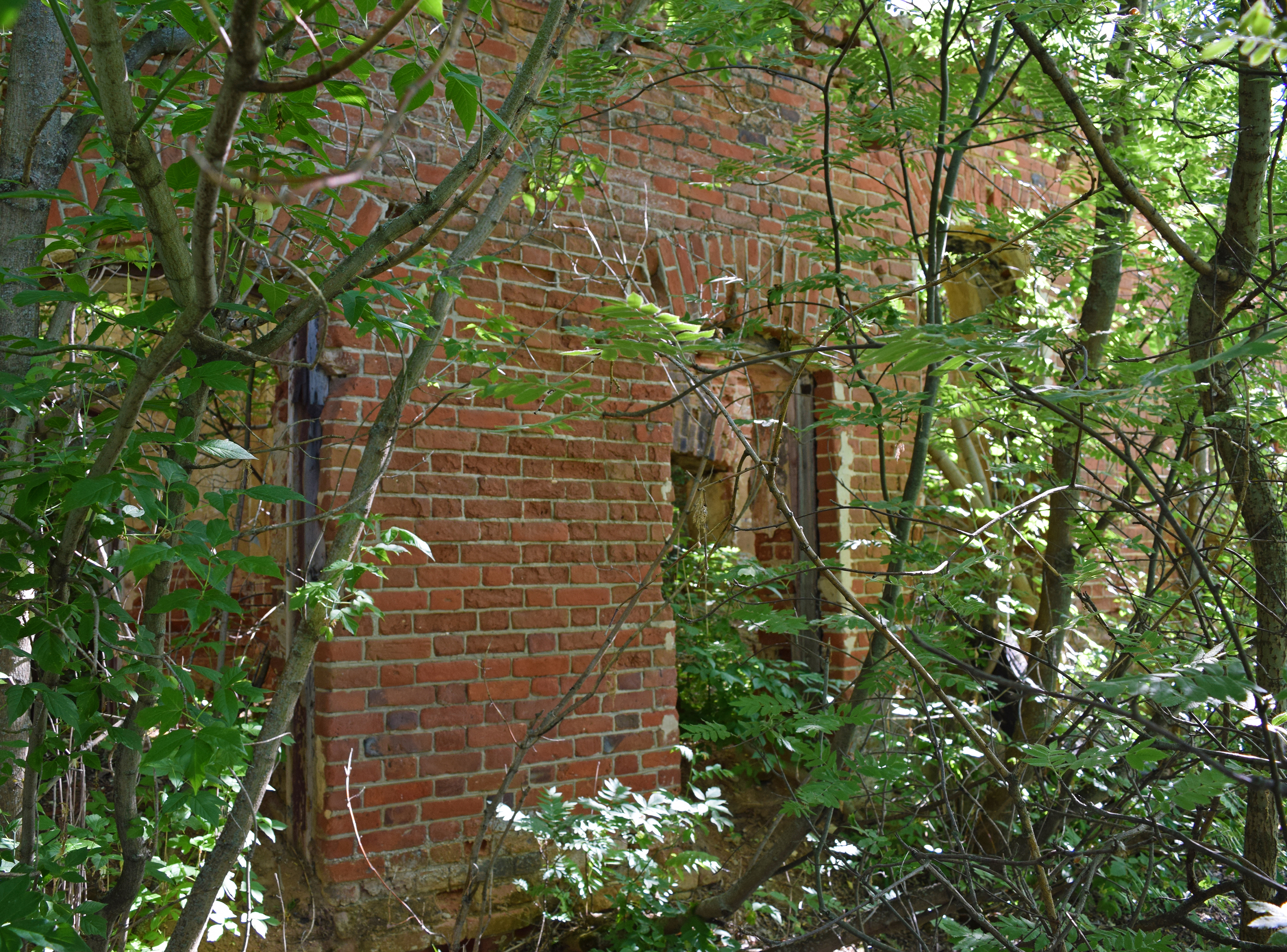 Здание сельской (приходской) школы, с.Новые Кельцы, Скопинский район Рязанской области